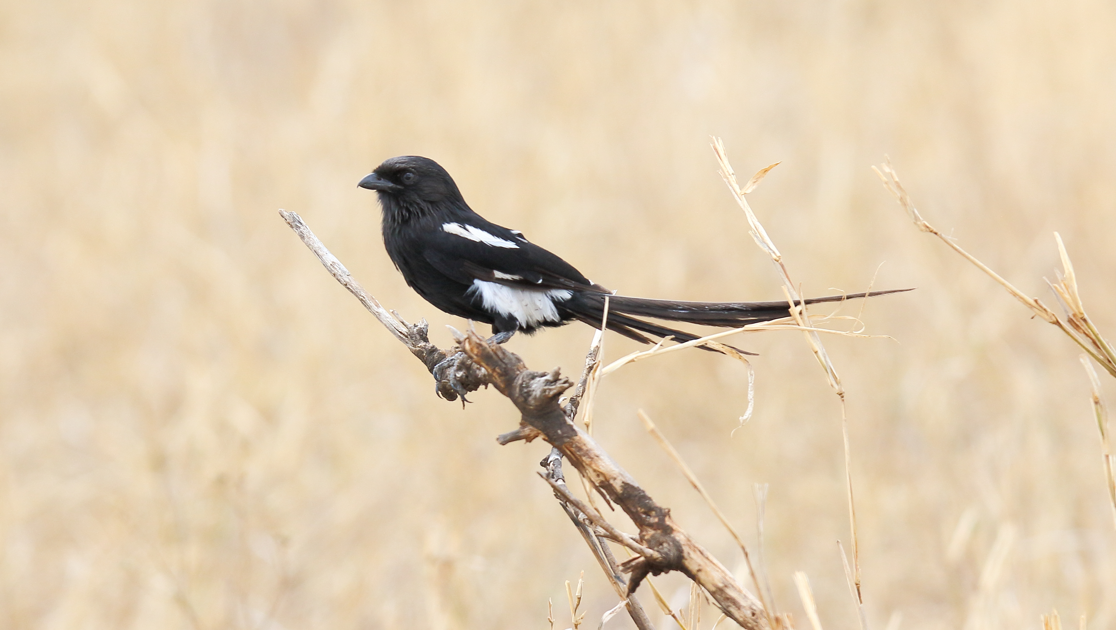 Magpie Shrike (Urolestes melanoleucus)